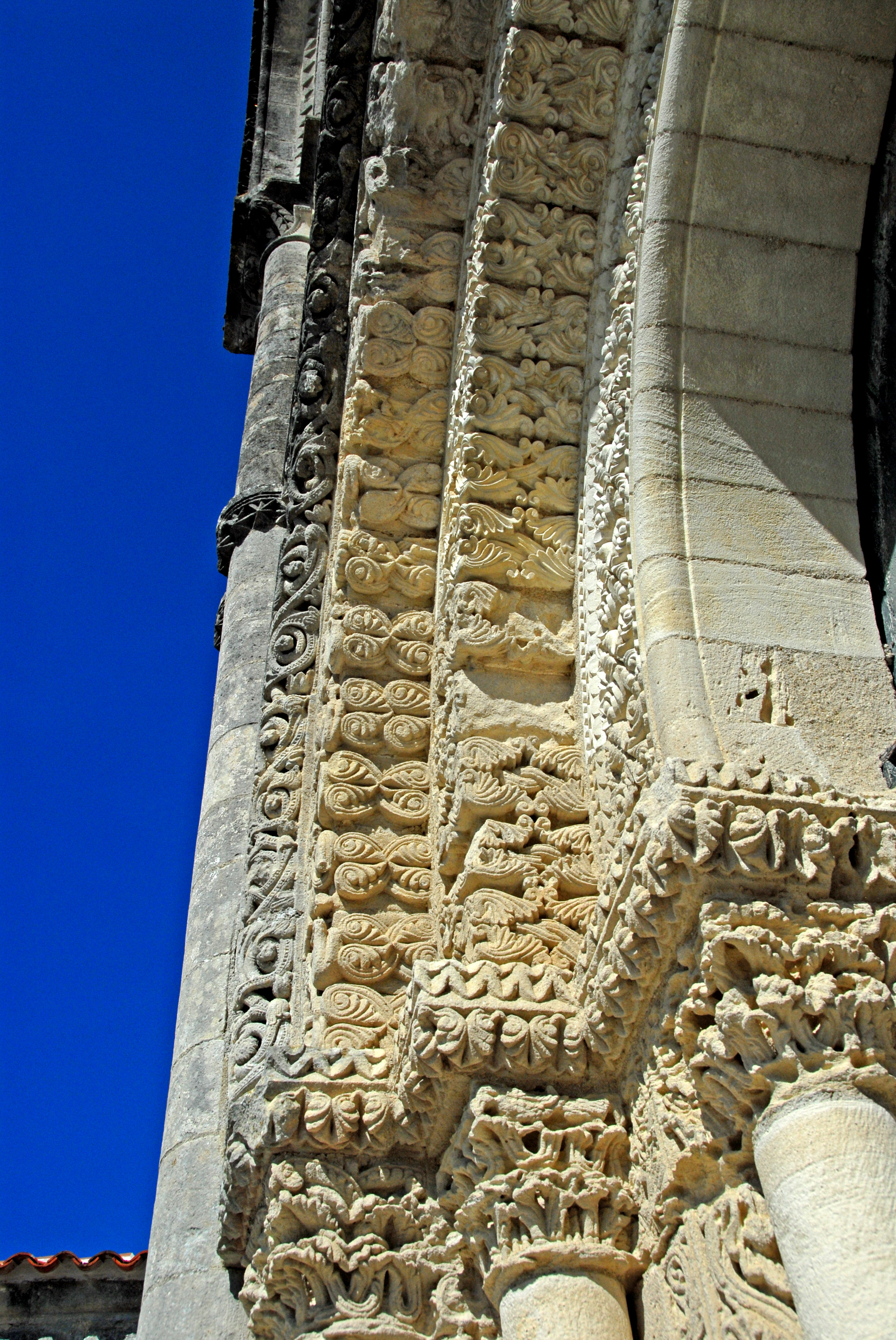 Ste.-Hérie, Archivoltenportal, Untersicht